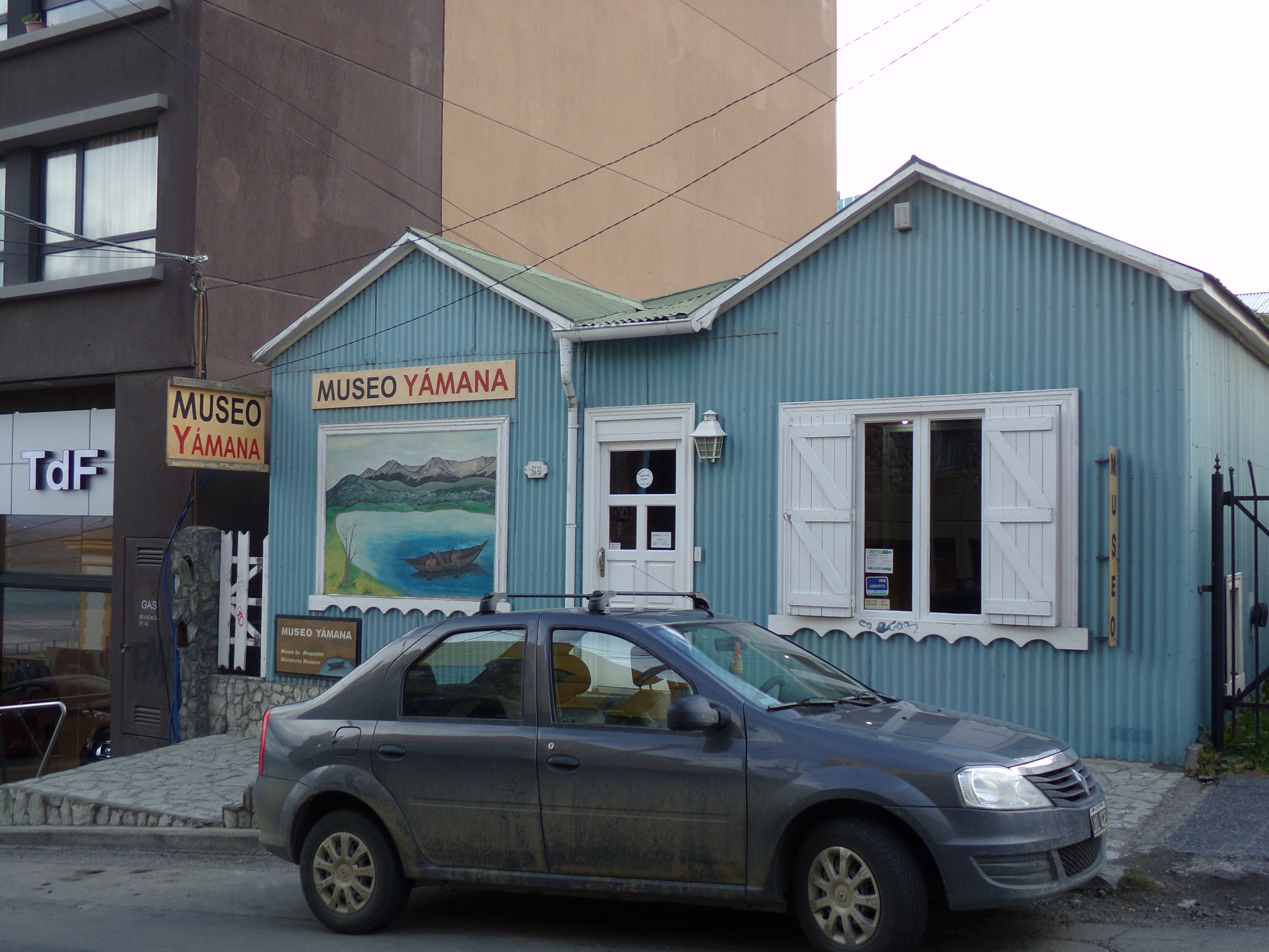 Museo Yámana, Ushuaia, Tierra del Fuego, Antártida